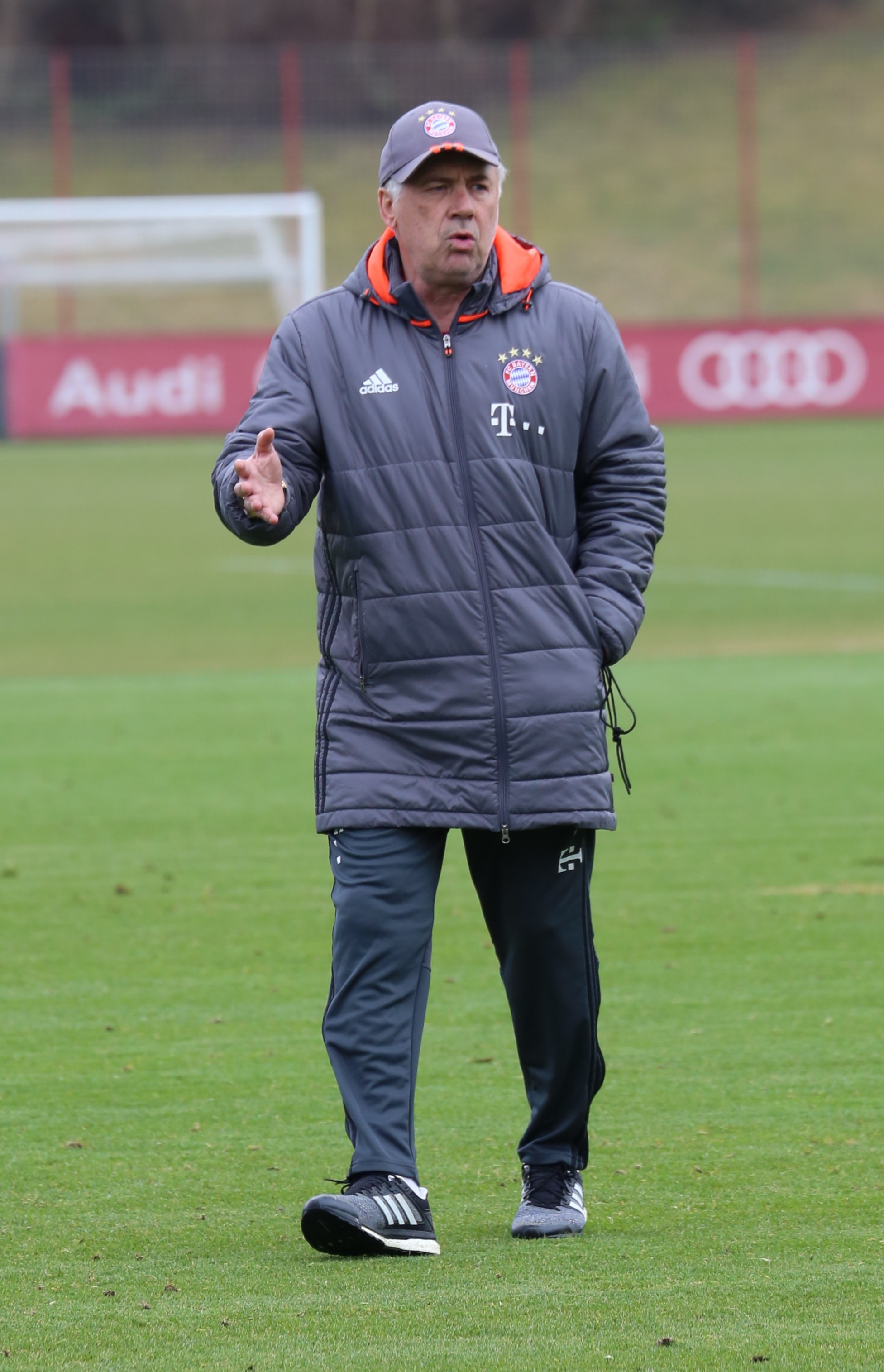 Carlo Ancelotti, Trainer, am 14. März 2017 beim Training auf dem Gelände des FC Bayern München